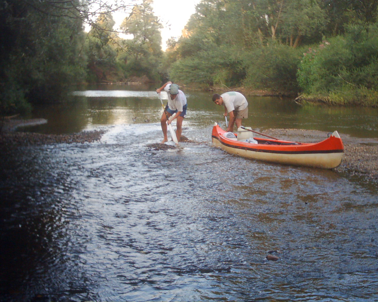 Vízitúra - képrejtvény